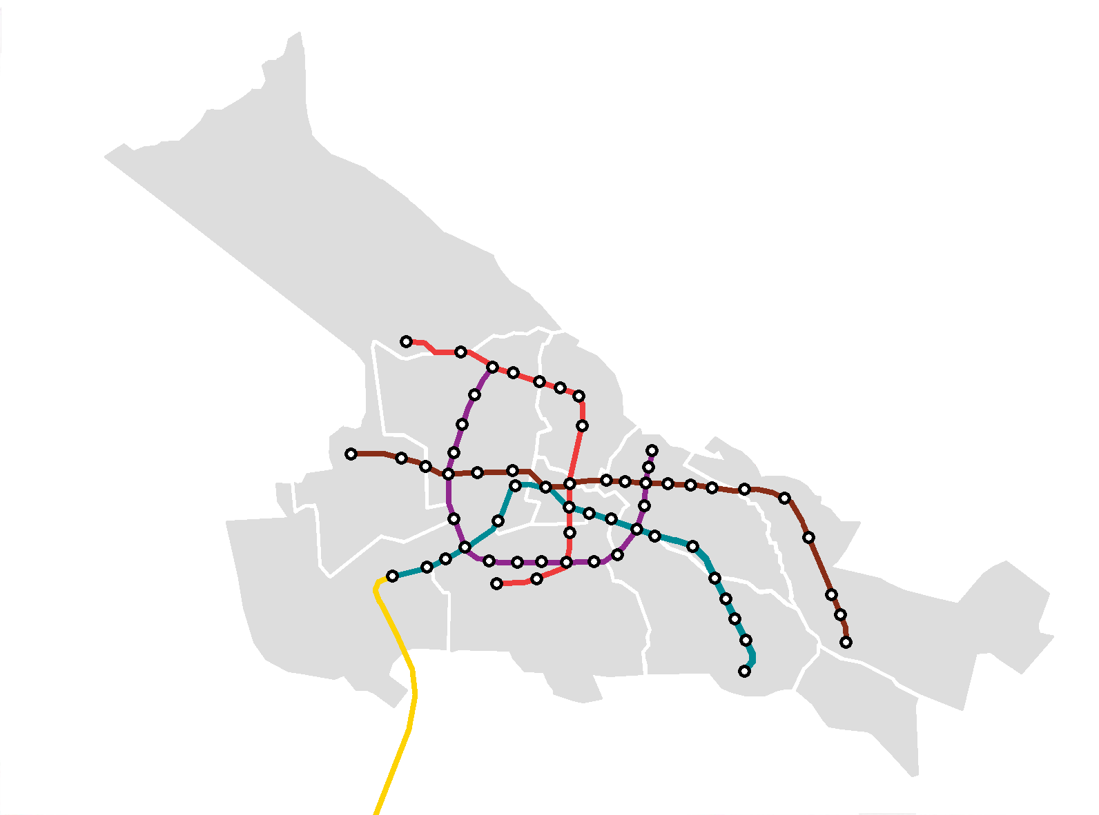 نقشه برنامه آینده مترو تبریز